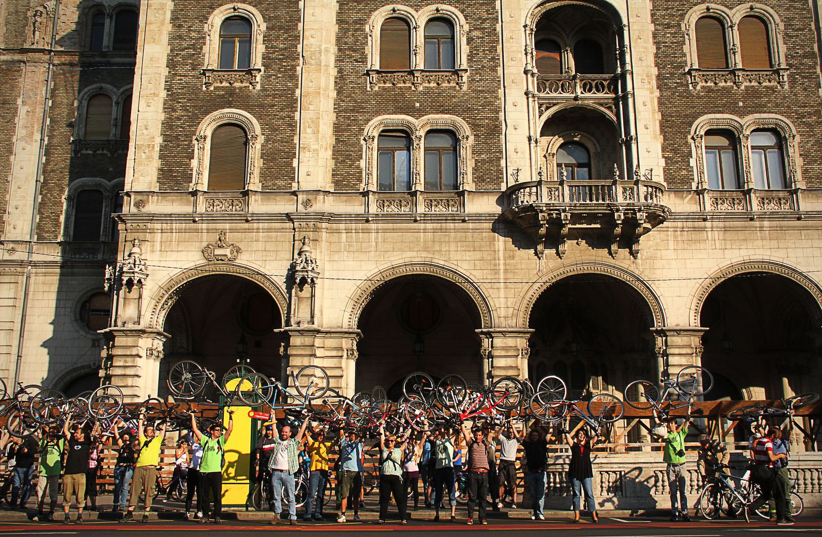 Bringaemelés az Andrássy úton